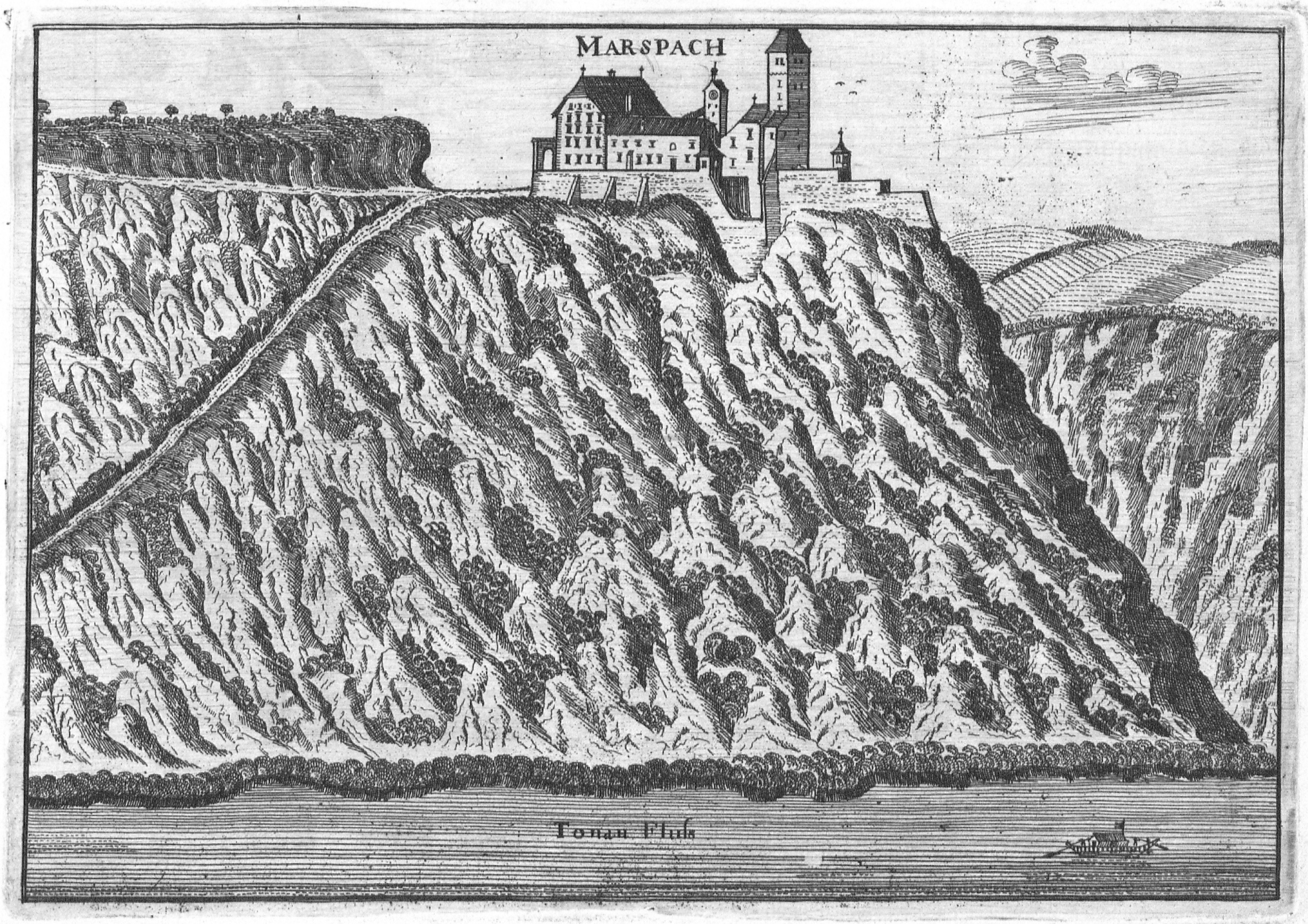 Schloss Marsbach um 1674